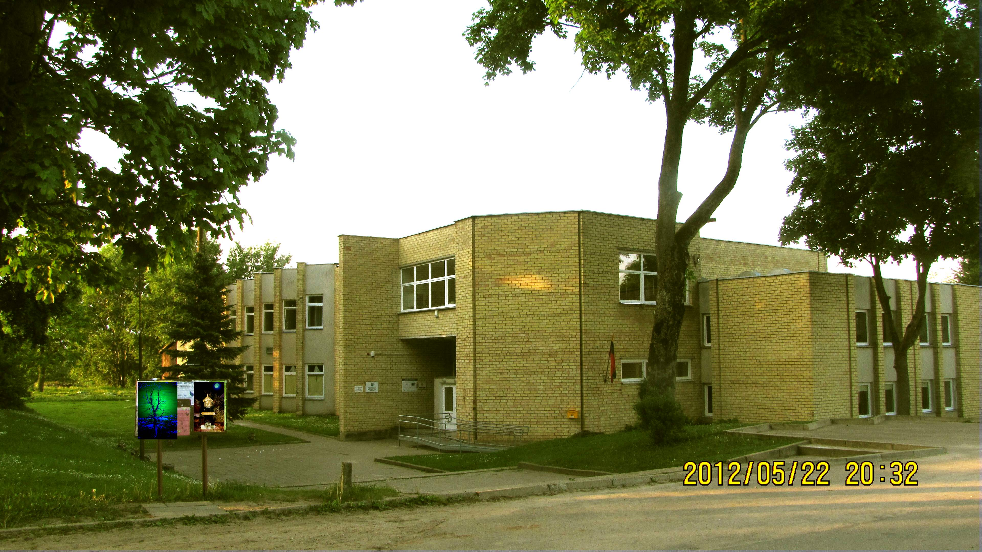 Nuotraukoje sovietmečiu statyti kultūros namai - dabar seniūnijos administracinis pastatas. Nuotraukoje matomas pagrindinis įėjimas. Tai pietvakarinė pastato pusė. Nuotrauka daryta 2012.05.22 d. Autorius Vytautas Degutis.